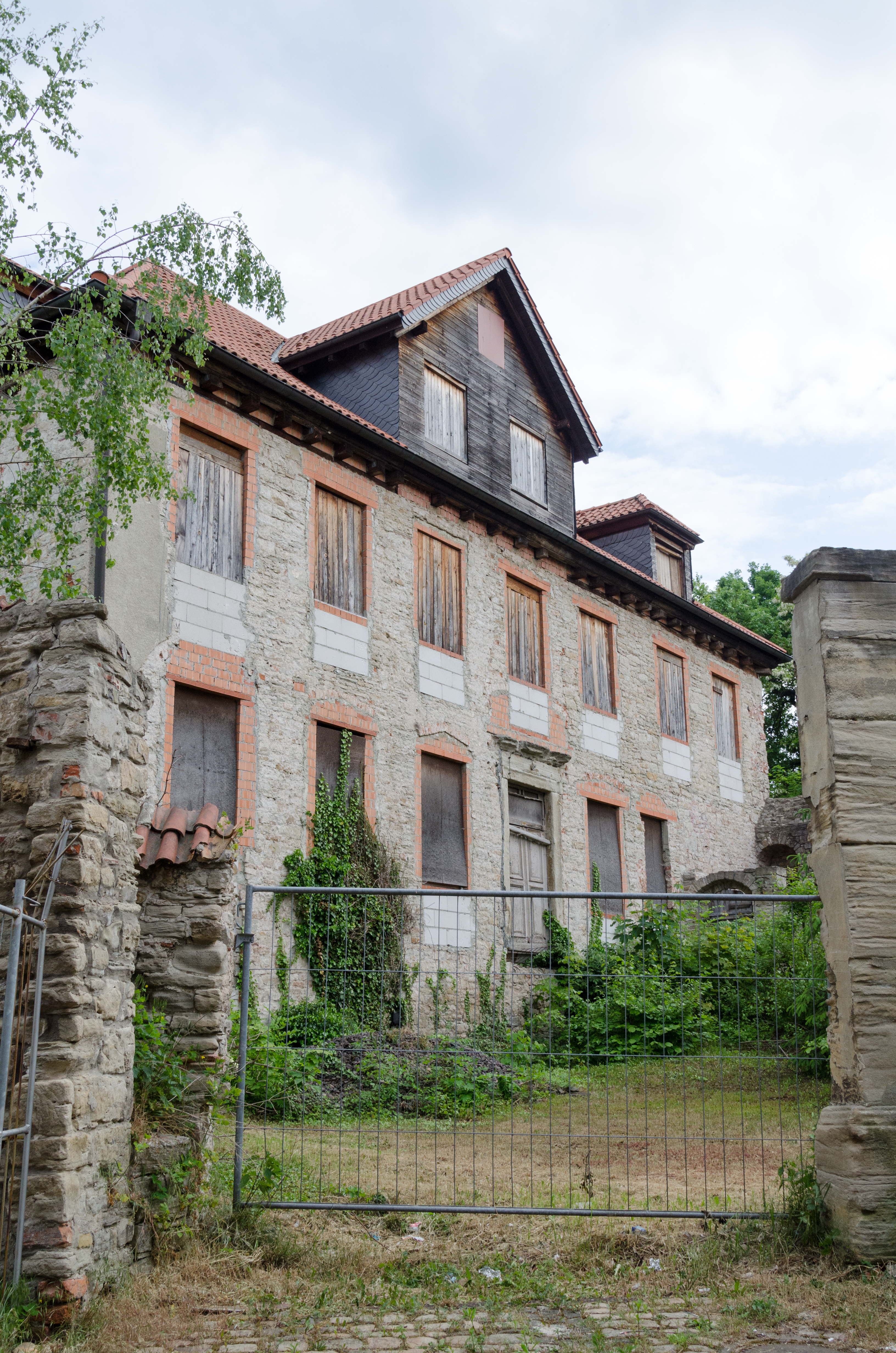 Zeitz, Brühl 23